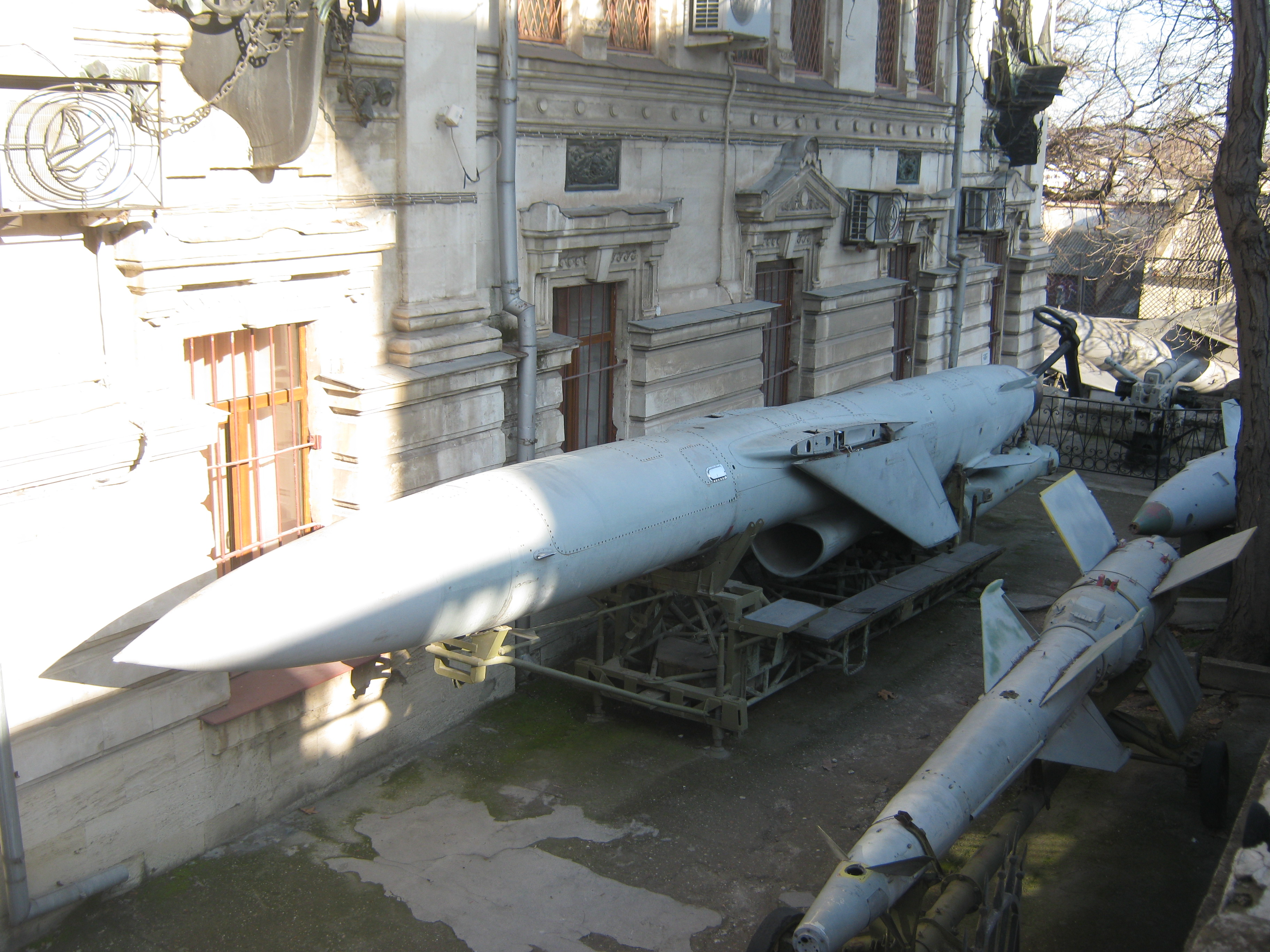 Ракета П-35 из экспозиции Музея Черноморского флота в Севастополе